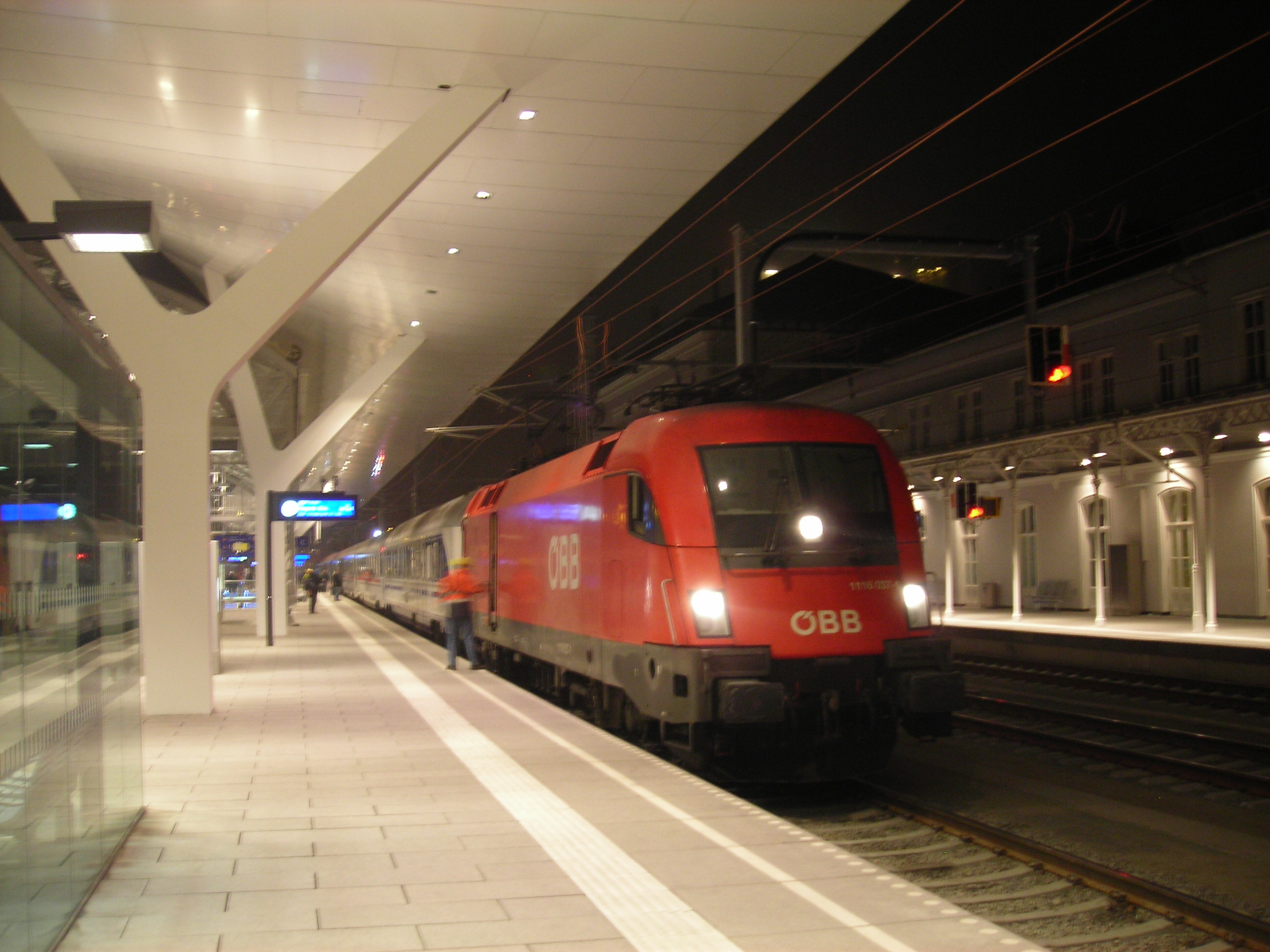 Salzburg Hauptbahnhof 2011 november 26-án kora hajnalban az átépítése idején